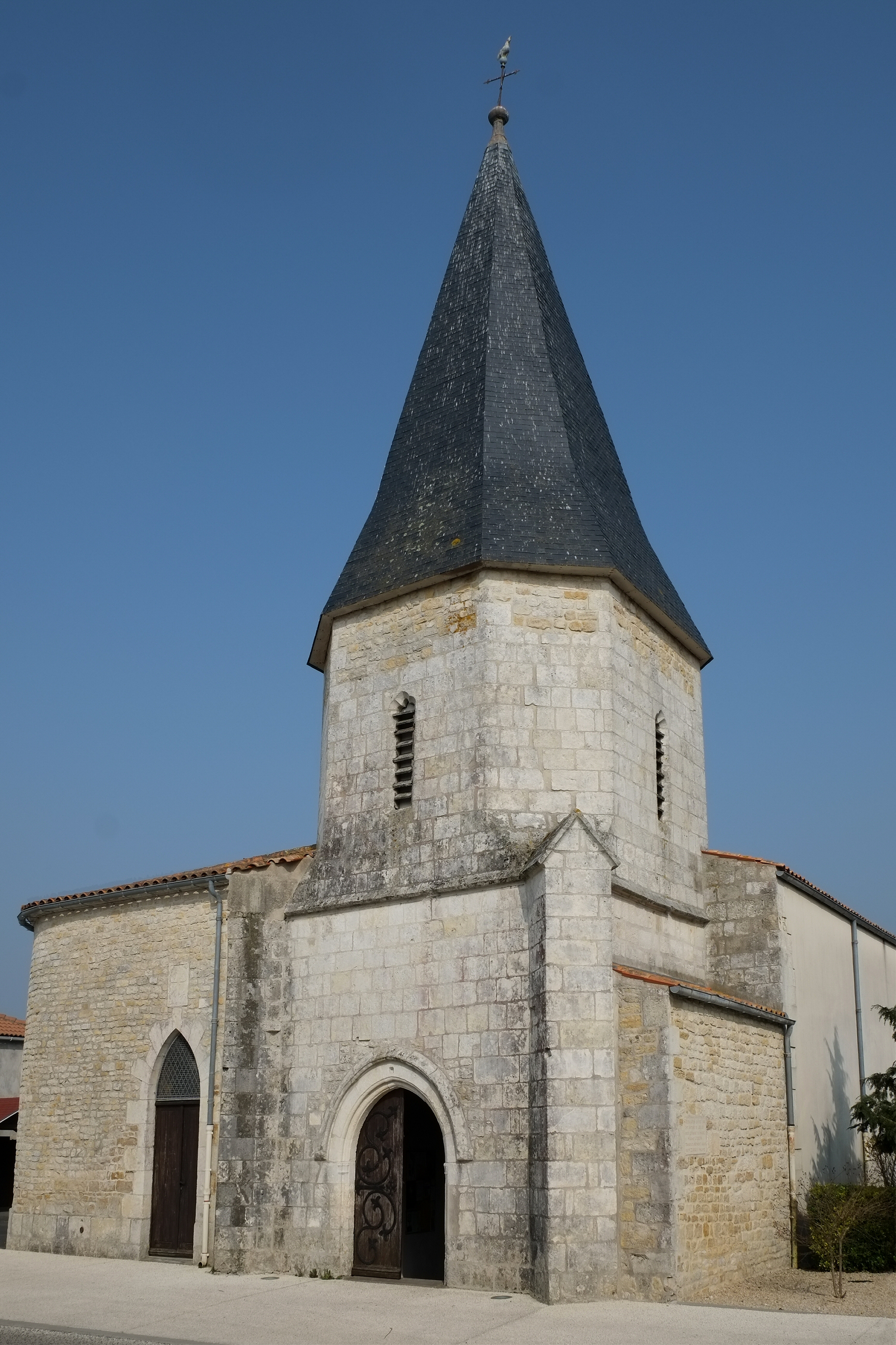 Église Saint-Nicolas Charron Charente-maritime France